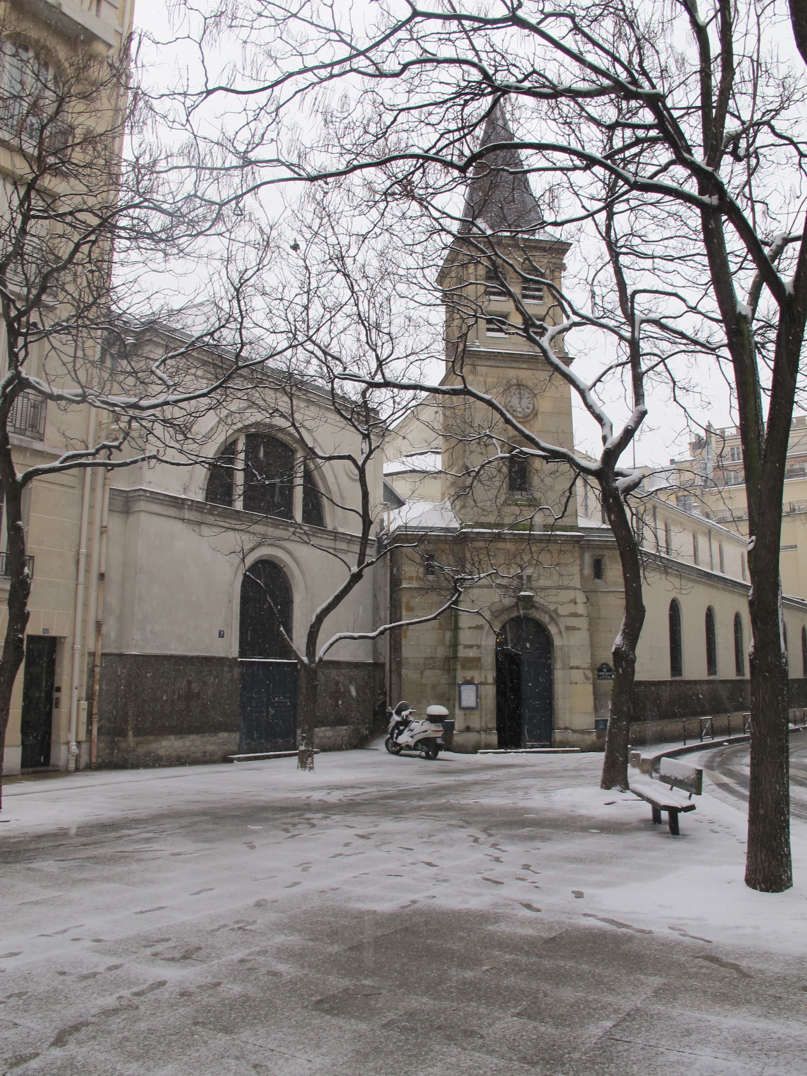 L'église Notre-Dame-de-Grâce-de-Passy sous la neige.